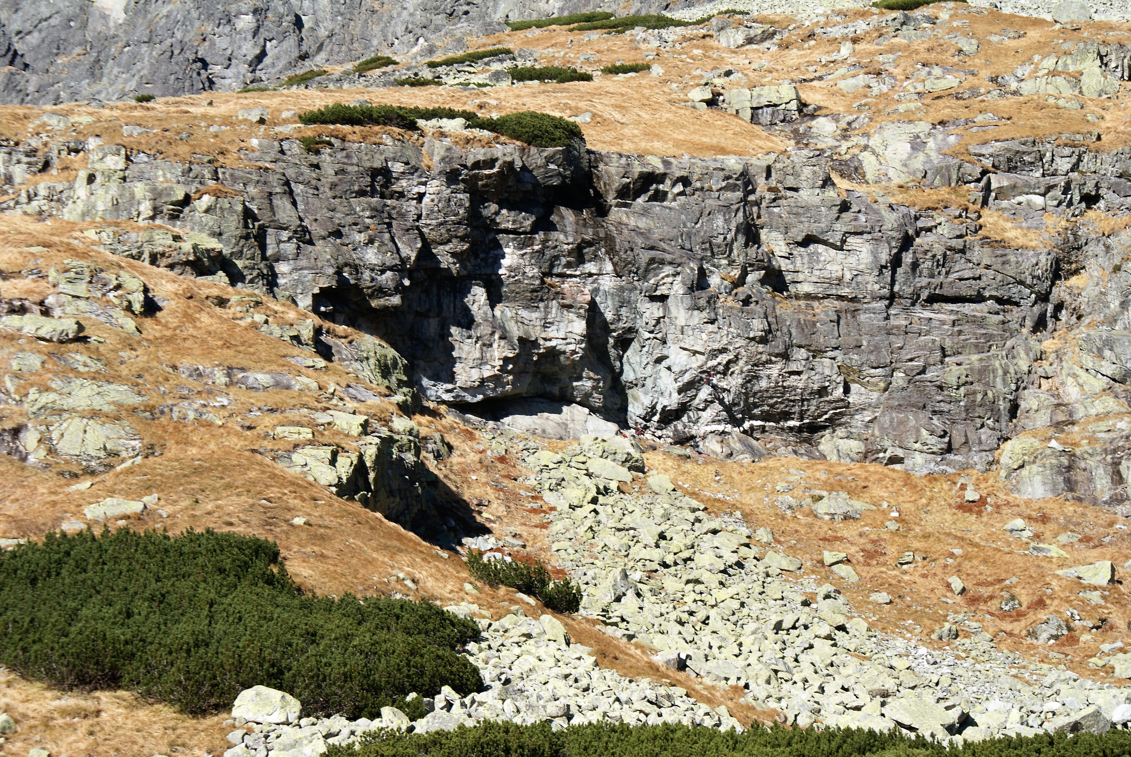 Večný dážď, Velická dolina, Vysoké Tatry